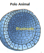 Identificação do Polo Animal na fase de blástula do zigoto